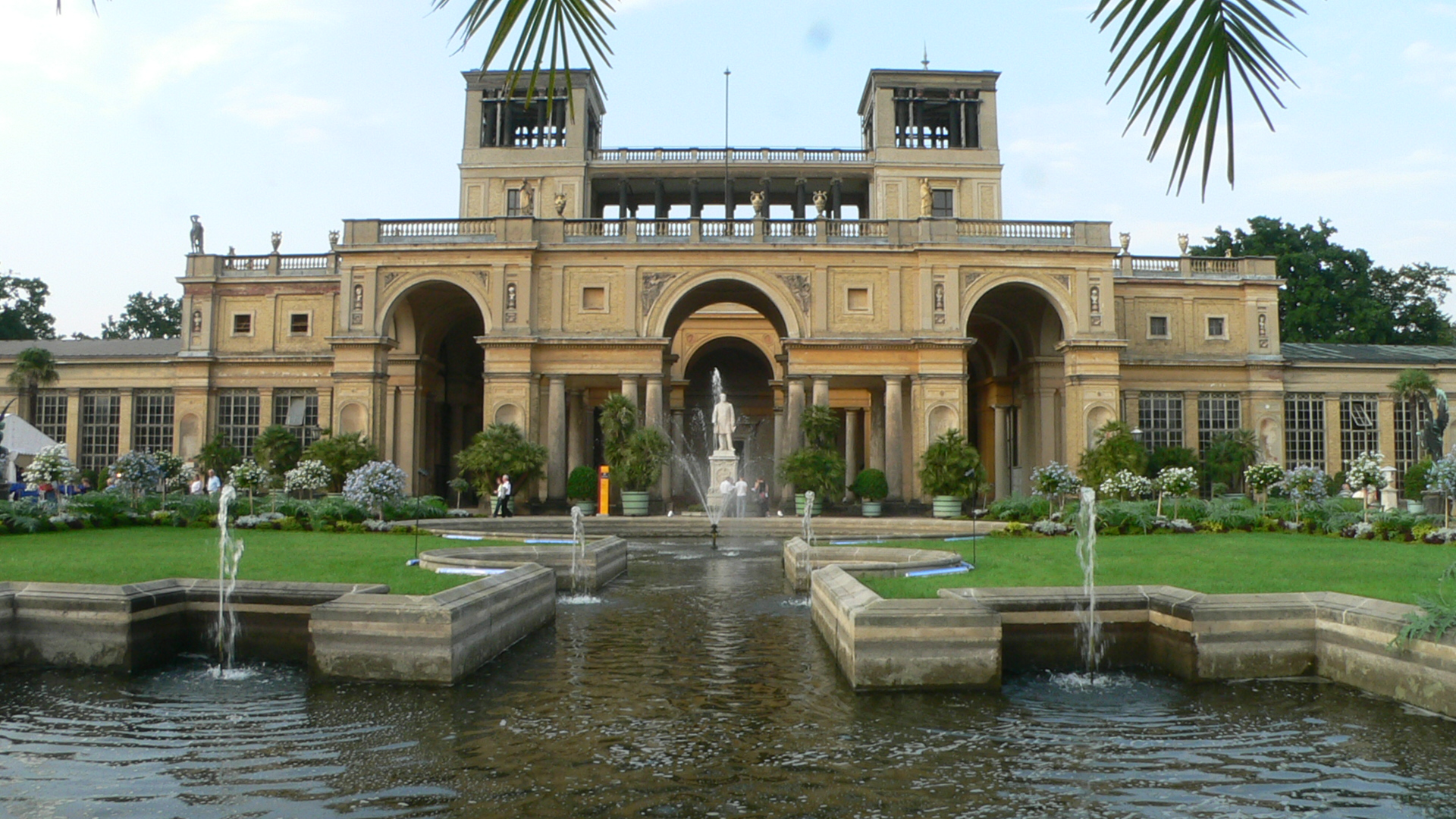 Orangerieschloss Potsdam main entrance